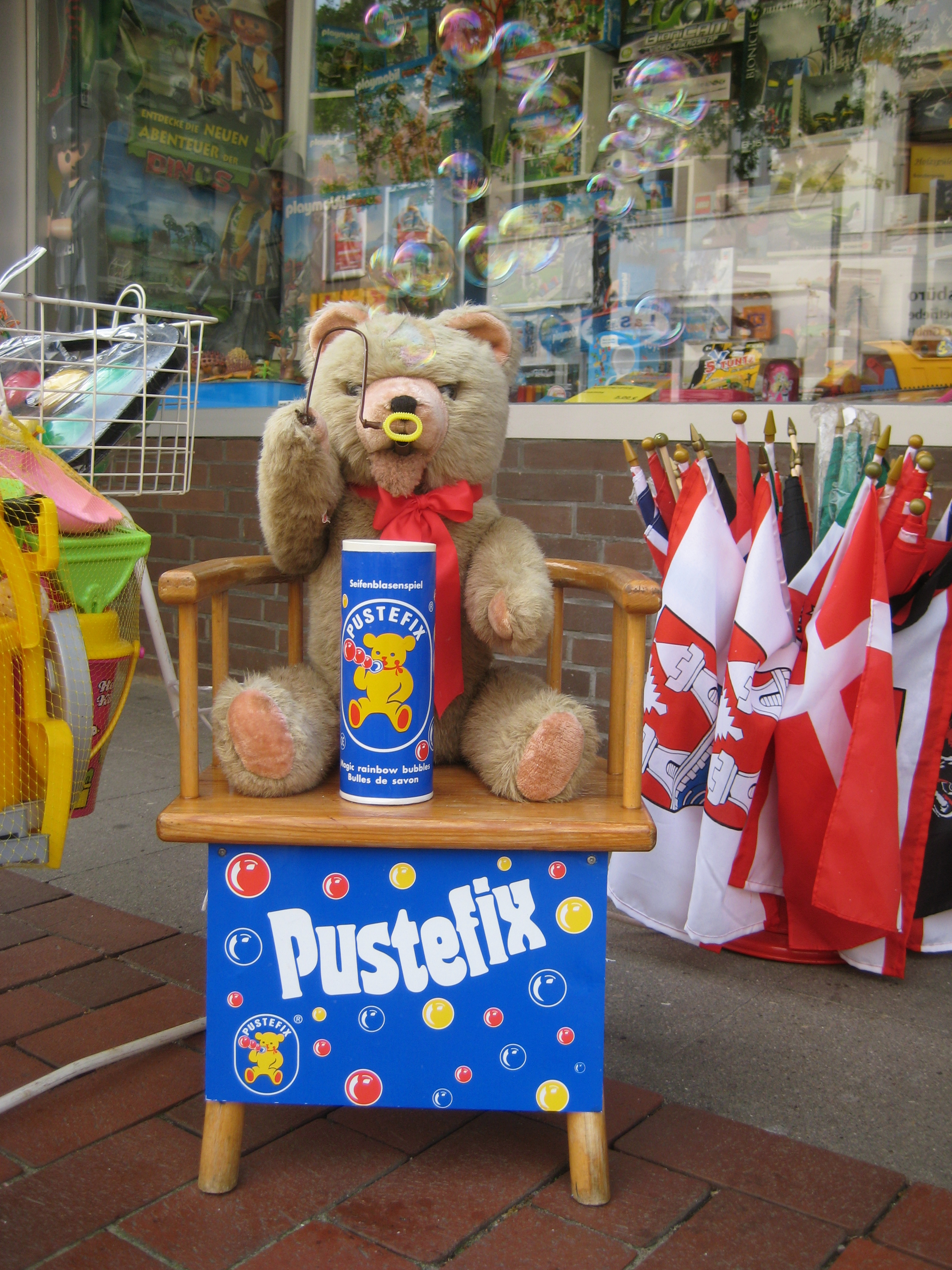 Pustefix